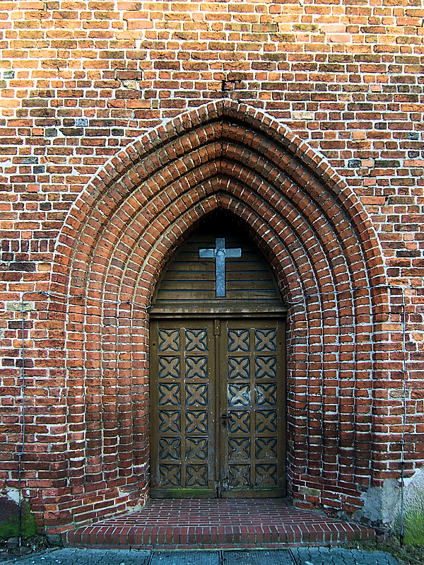 Kirchenportal in Kröpelin